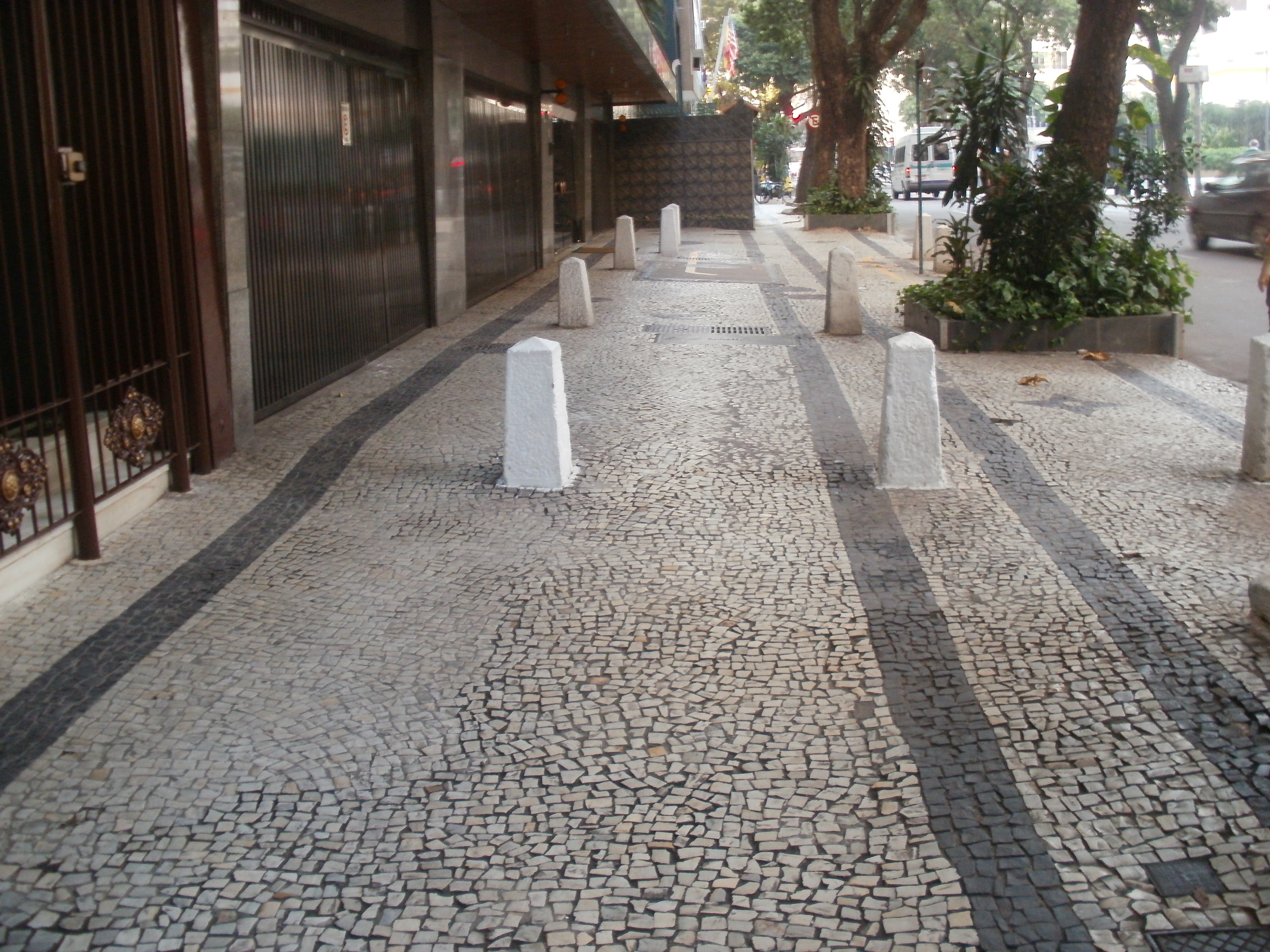 Rua Tonelero, em Copacabana, Rio de Janeiro, Brasil.